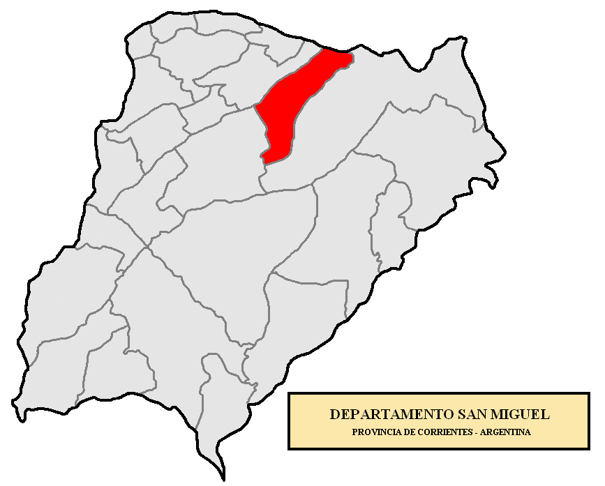 Ubicación de San Miguel. Localización del Departamento San Miguel, en la provincia de Corrientes, Argentina.